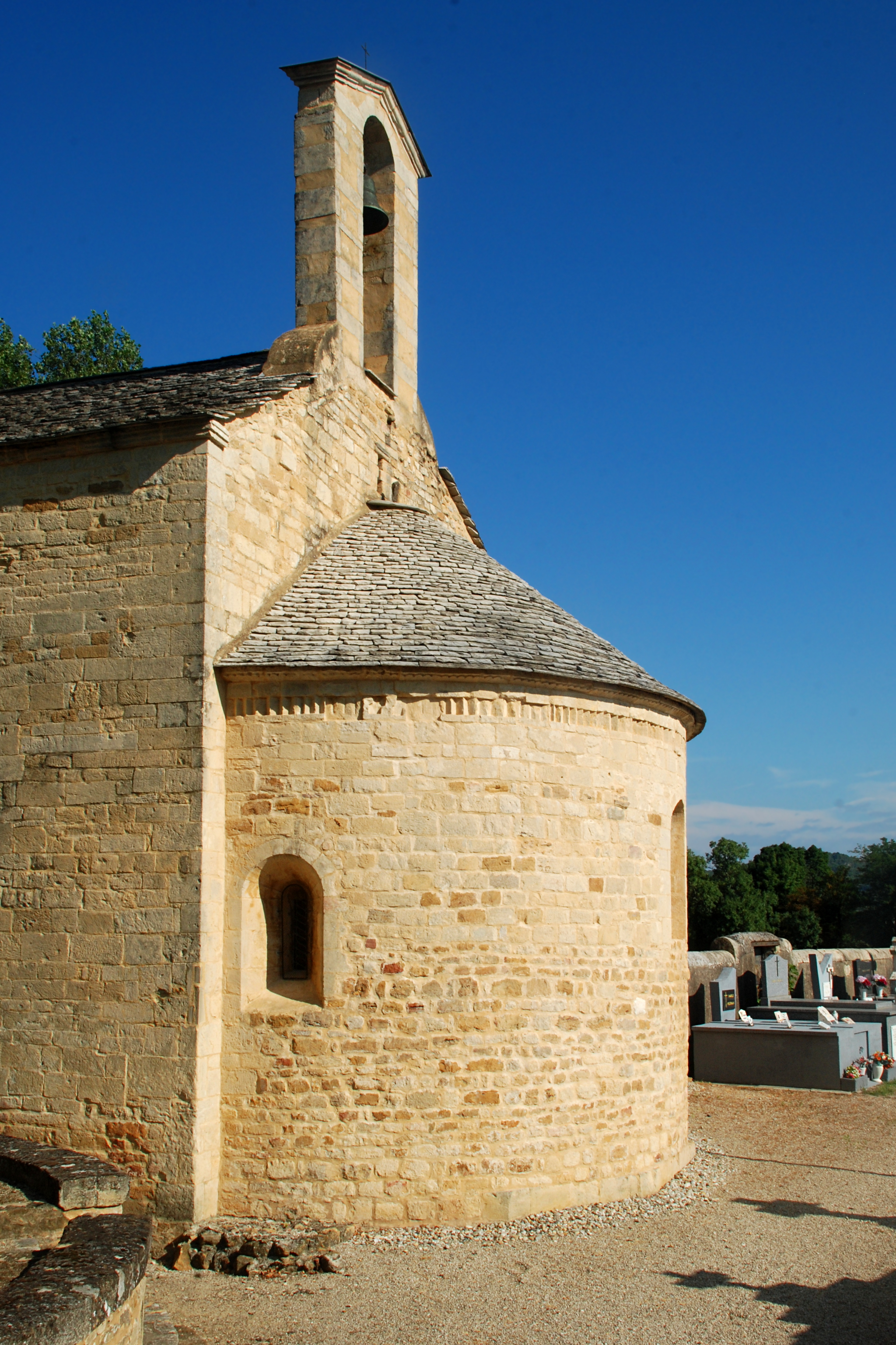 France - Gard - Sabran - Combe - Chapelle Saint-Julien-de-Pistrin